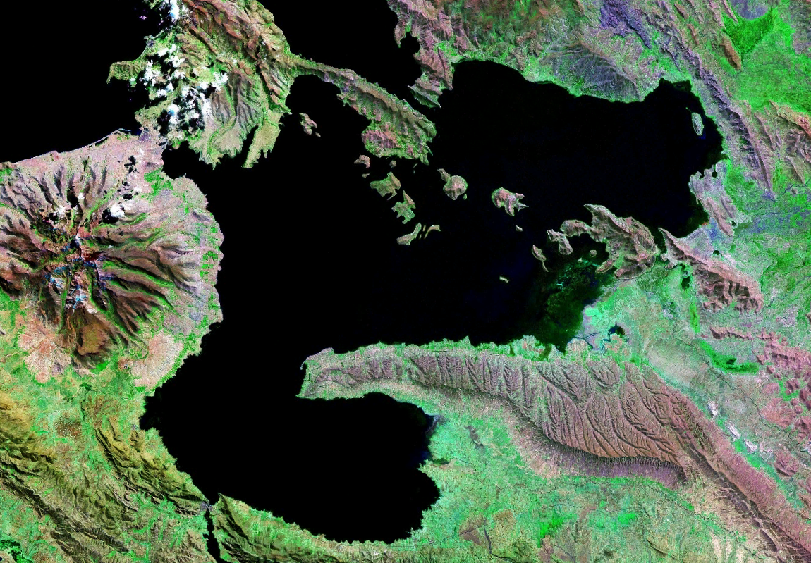 Imagen satelital del Lago Menor, (Lago Titicaca), compartidos por Perú y Bolivia.